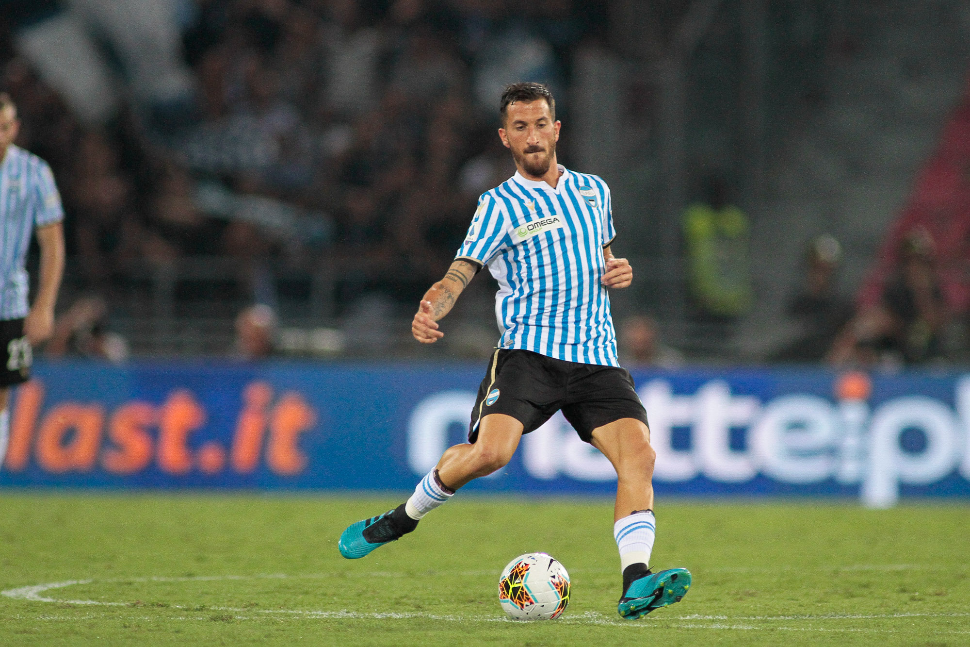 Mirko Valdifiori in azione